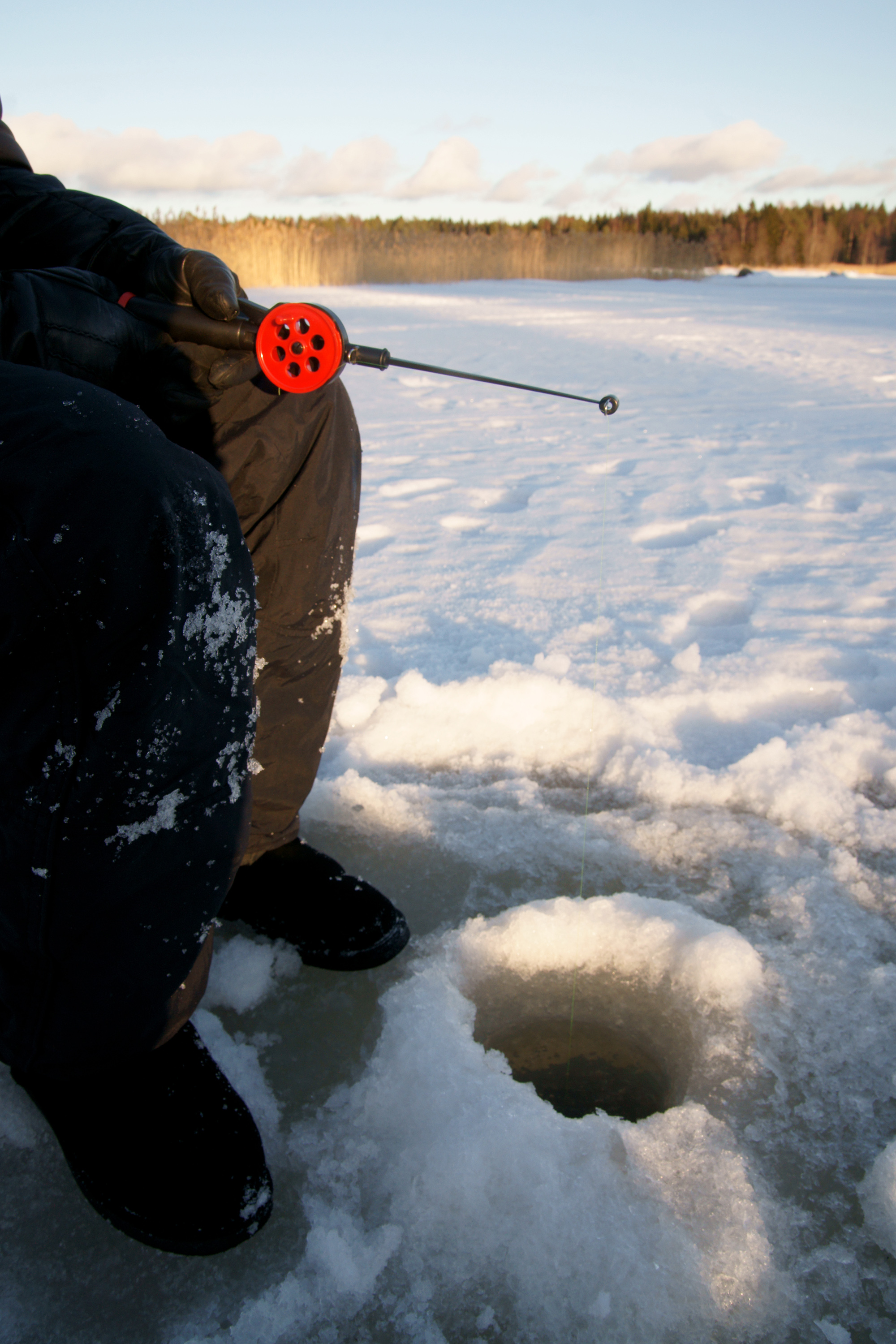 Pilkkimistä.